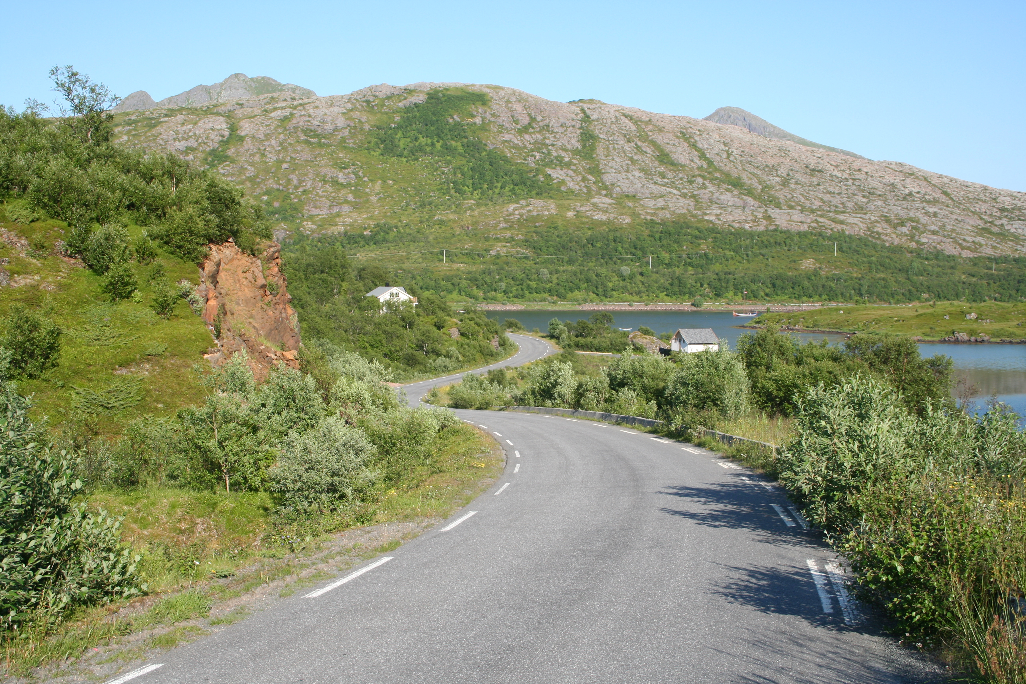 Fylkesvei 913 (Nordland) ved Oppsåta i Jørnfjorden i Bø i Vesterålen